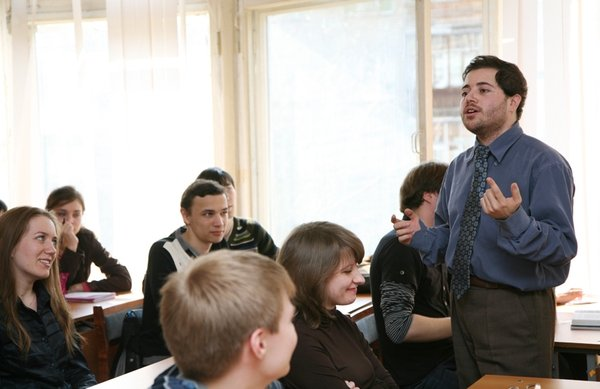 Алек Эпштейн в Уральском госуниверситете, апрель 2008 г.